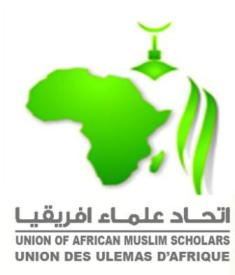 logo de l'union des ulémas